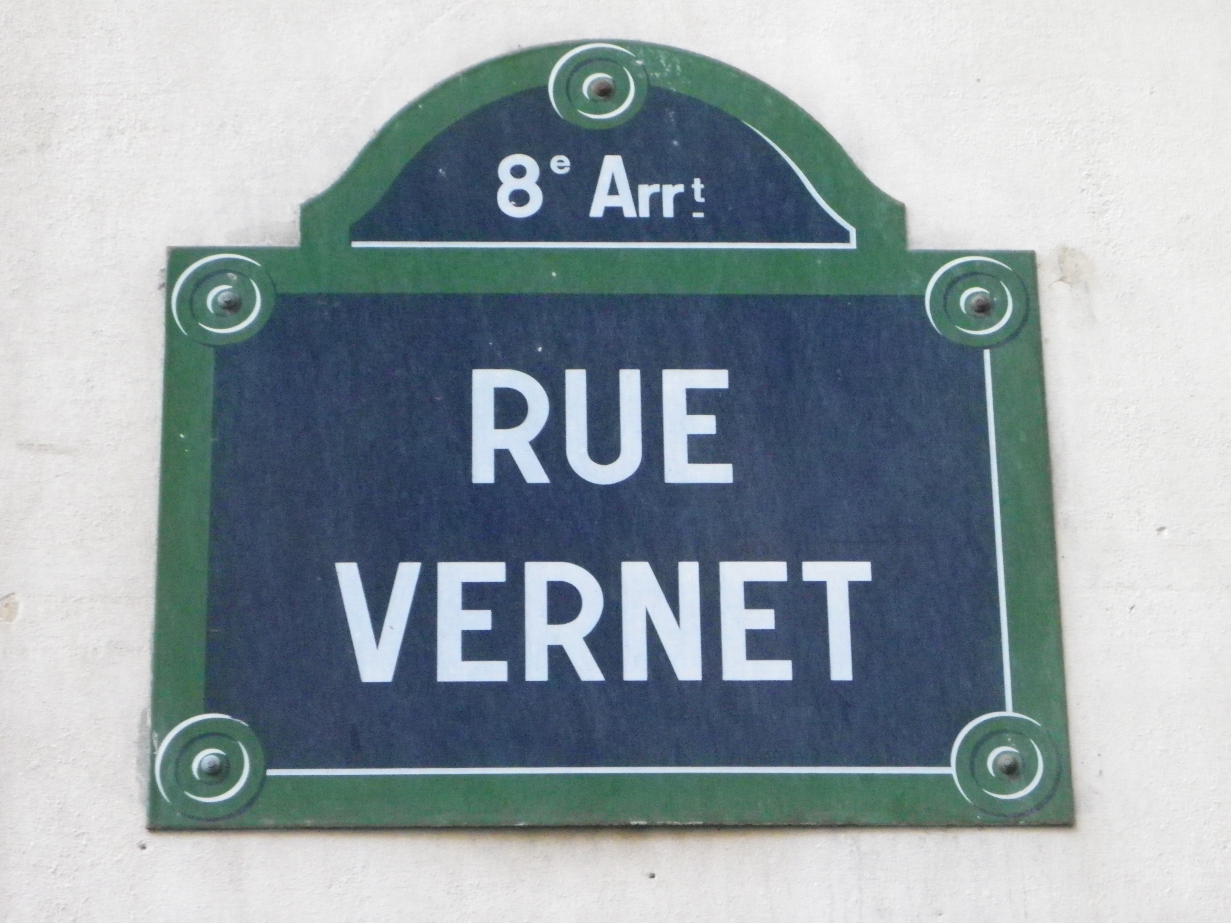 Plaque de la rue Vernet à Paris